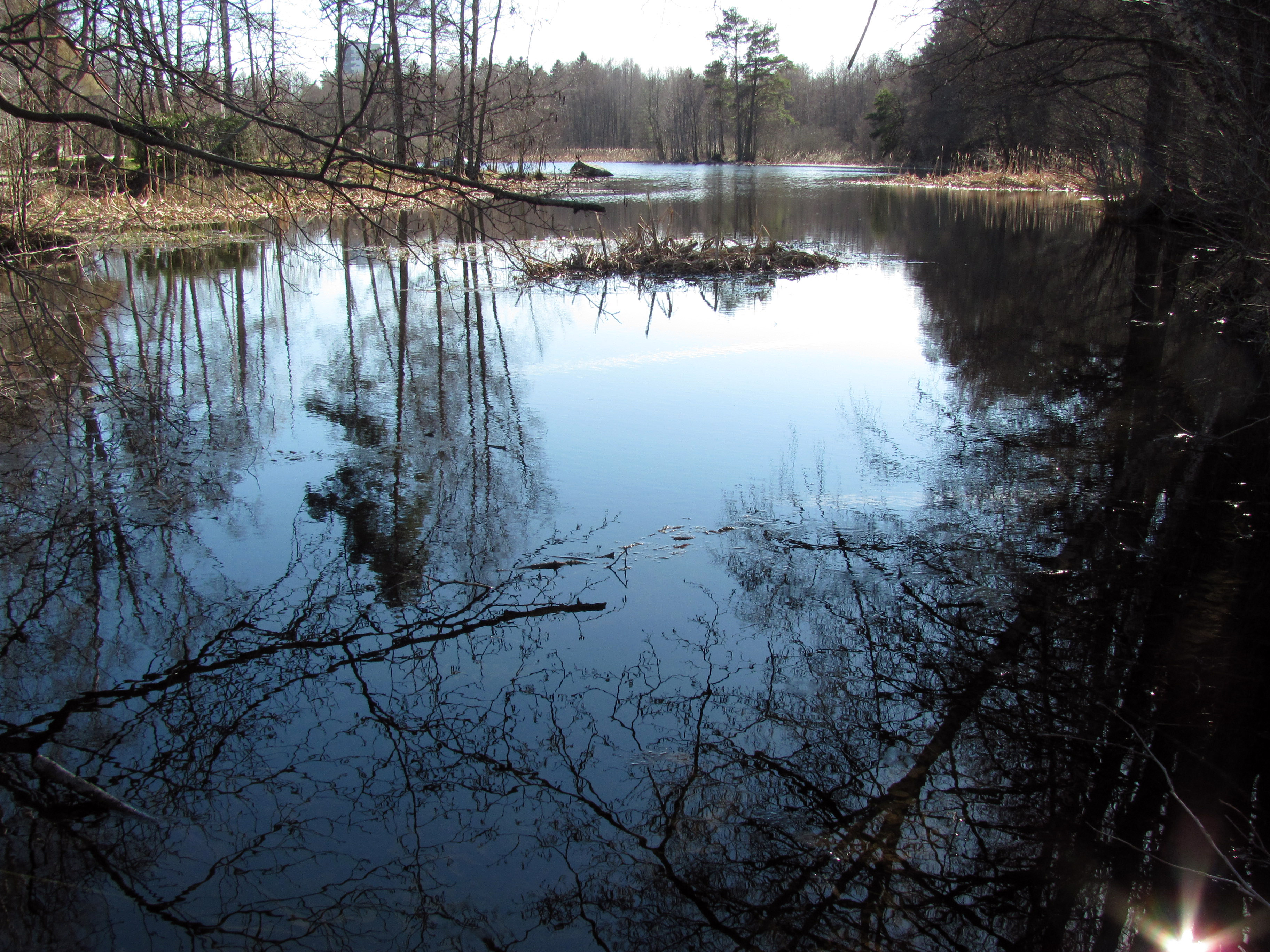 Dammträsk